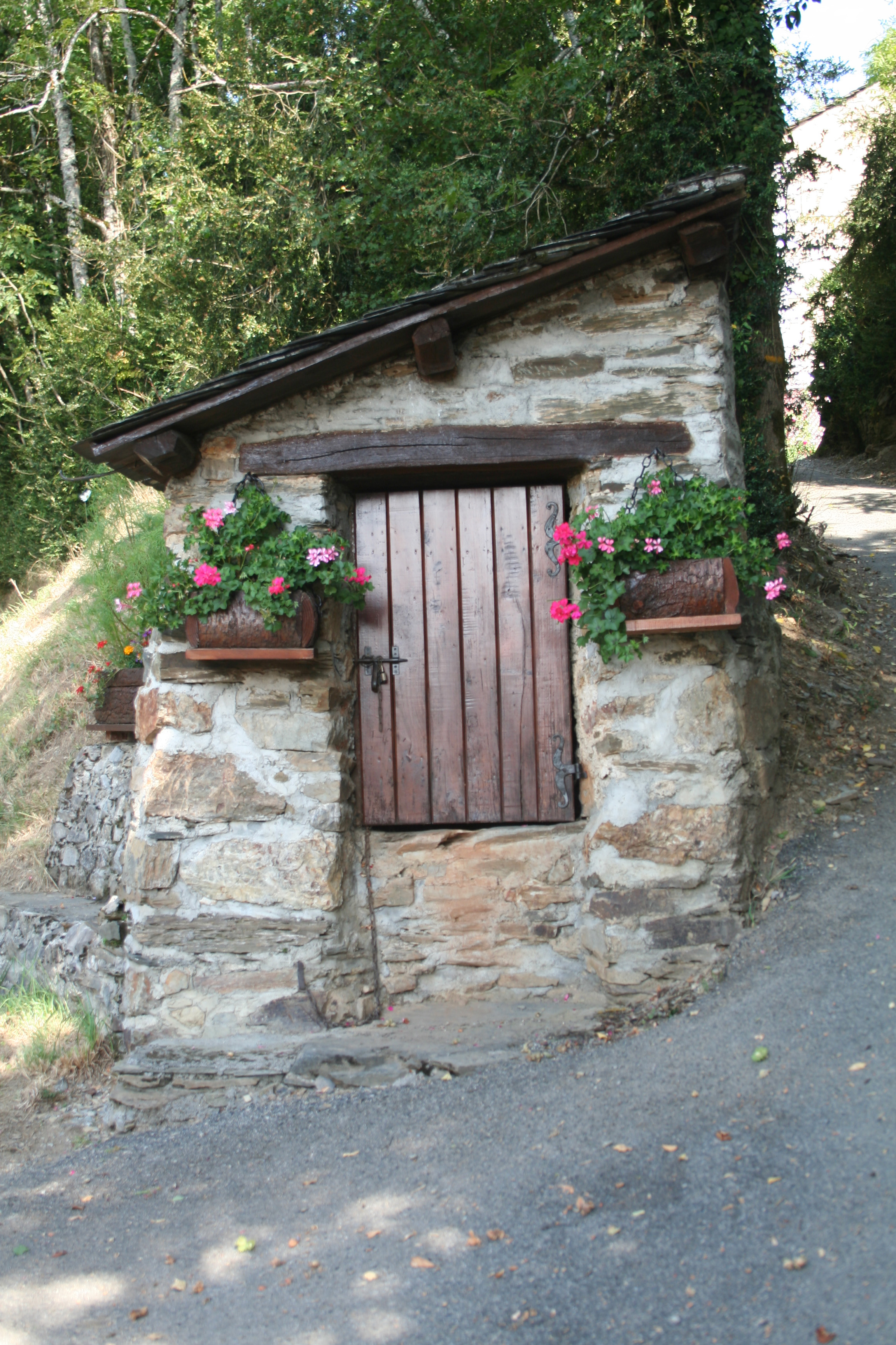 Senaux (Tarn) - ancien puits.